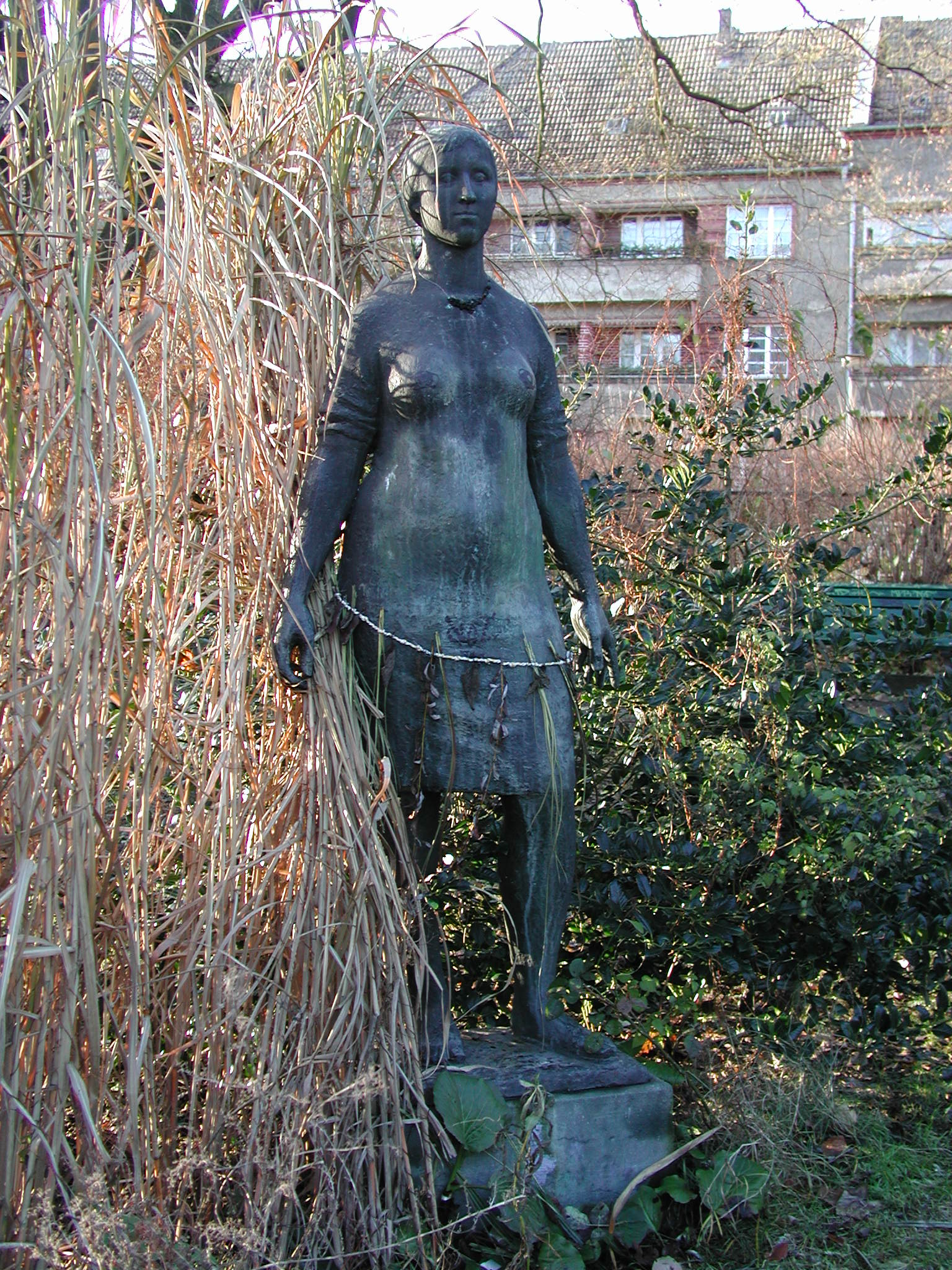 Trümmerfrauen-Denkmal von Eberhard Bachmann in Berlin-Weißensee